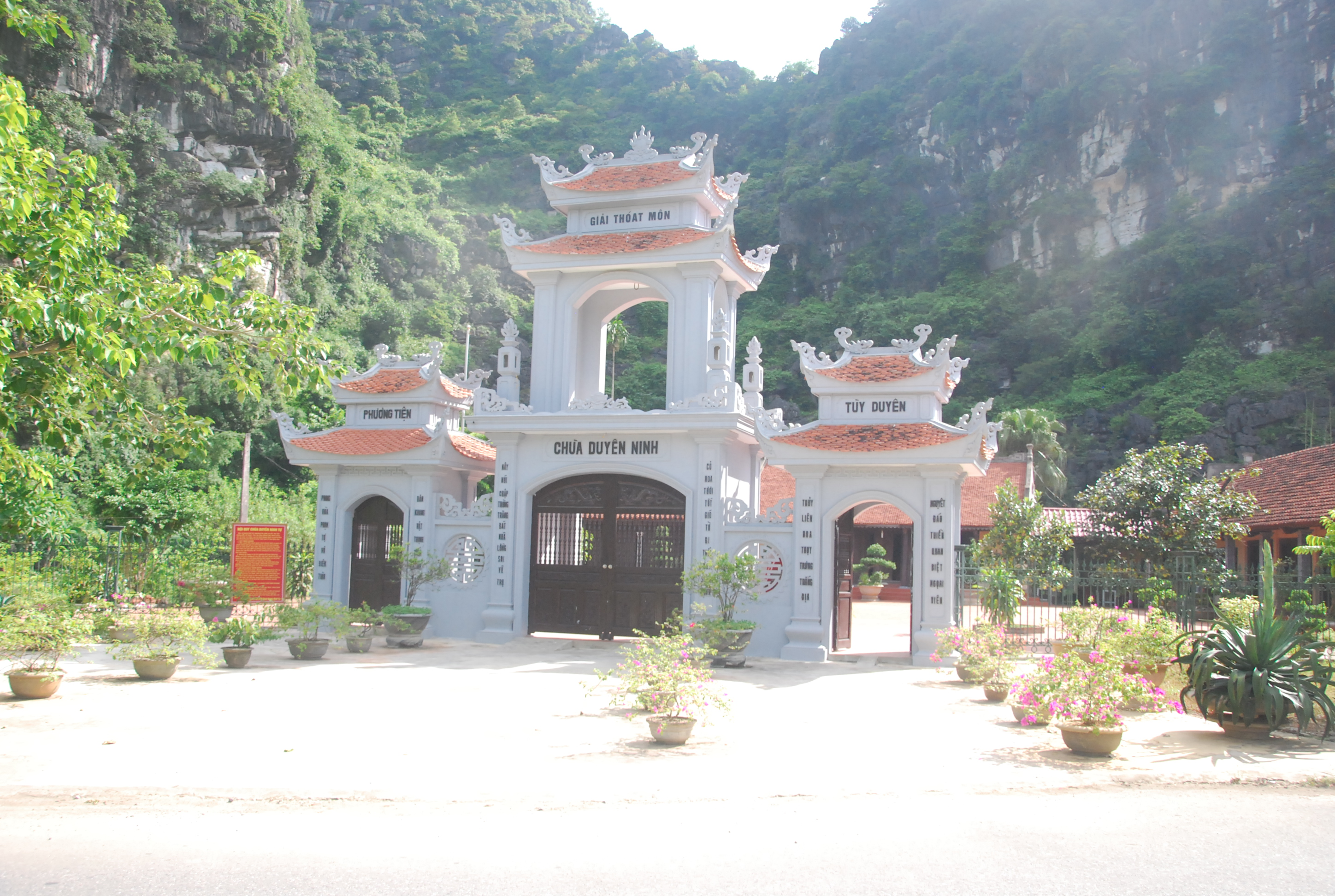 Chùa Duyên Ninh trong Quần thể di tích cố đô Hoa Lư ở Ninh Bình